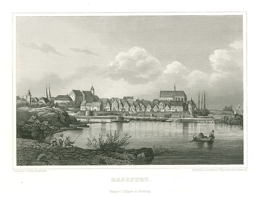 Hassfurt. Stahlstich nach Vorzeichnung von Fritz Bamberger, 1847, aus: Ludwig Braunfels; Die Mainufer und ihre nächsten Umgebungen. Verlag Carl Etlinger, Würzburg 1847. Gedruckt in der Kunstanstalt von Carl Mayer, Nürnberg.